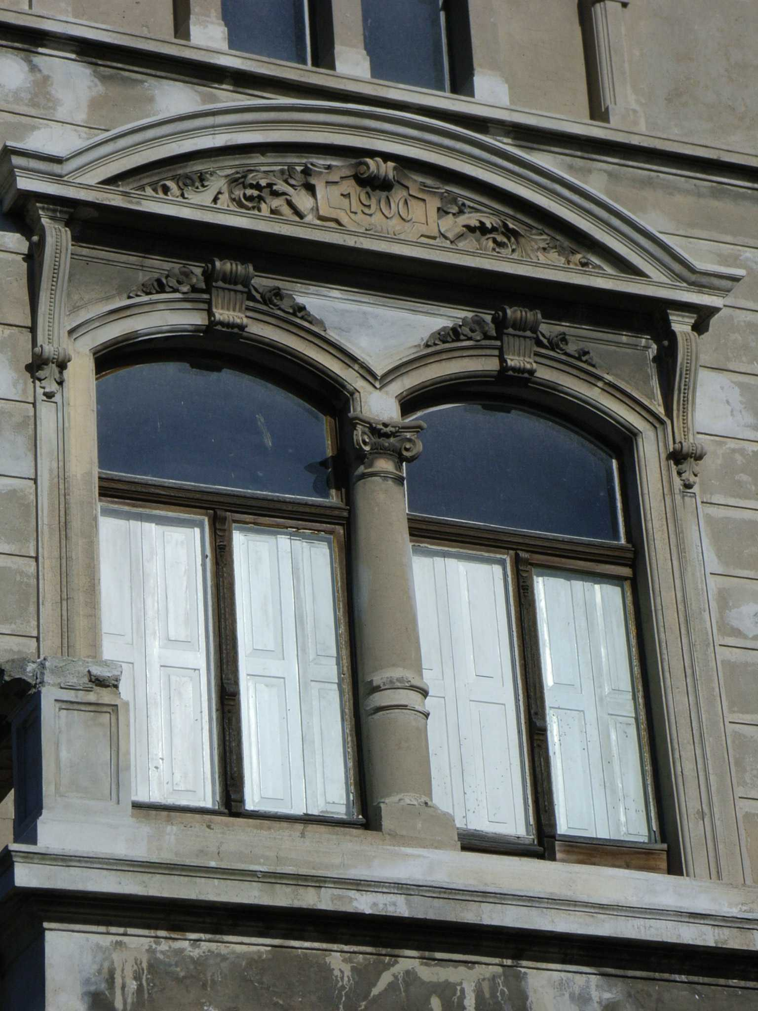 verlassene Villa der Jahrhundertwende, erbaut 1900, Titz-Rödingen, NRW